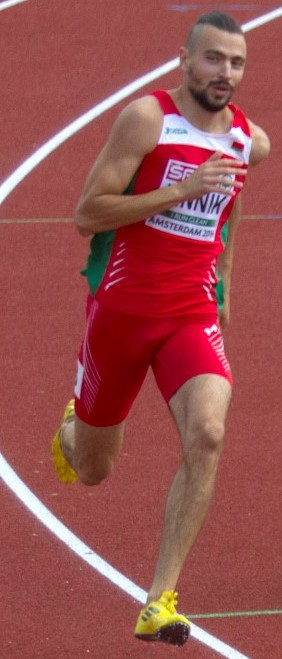 0154 reeksen 400m rooney